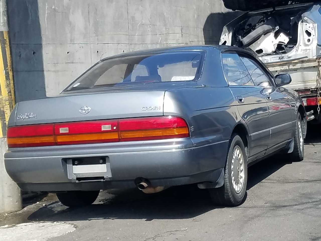 クラウン ハードトップ ロイヤルサルーン（前期型）